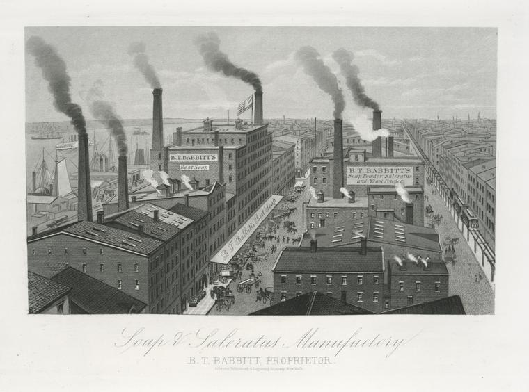 Benjamin Babbitt Soap Manufacturing